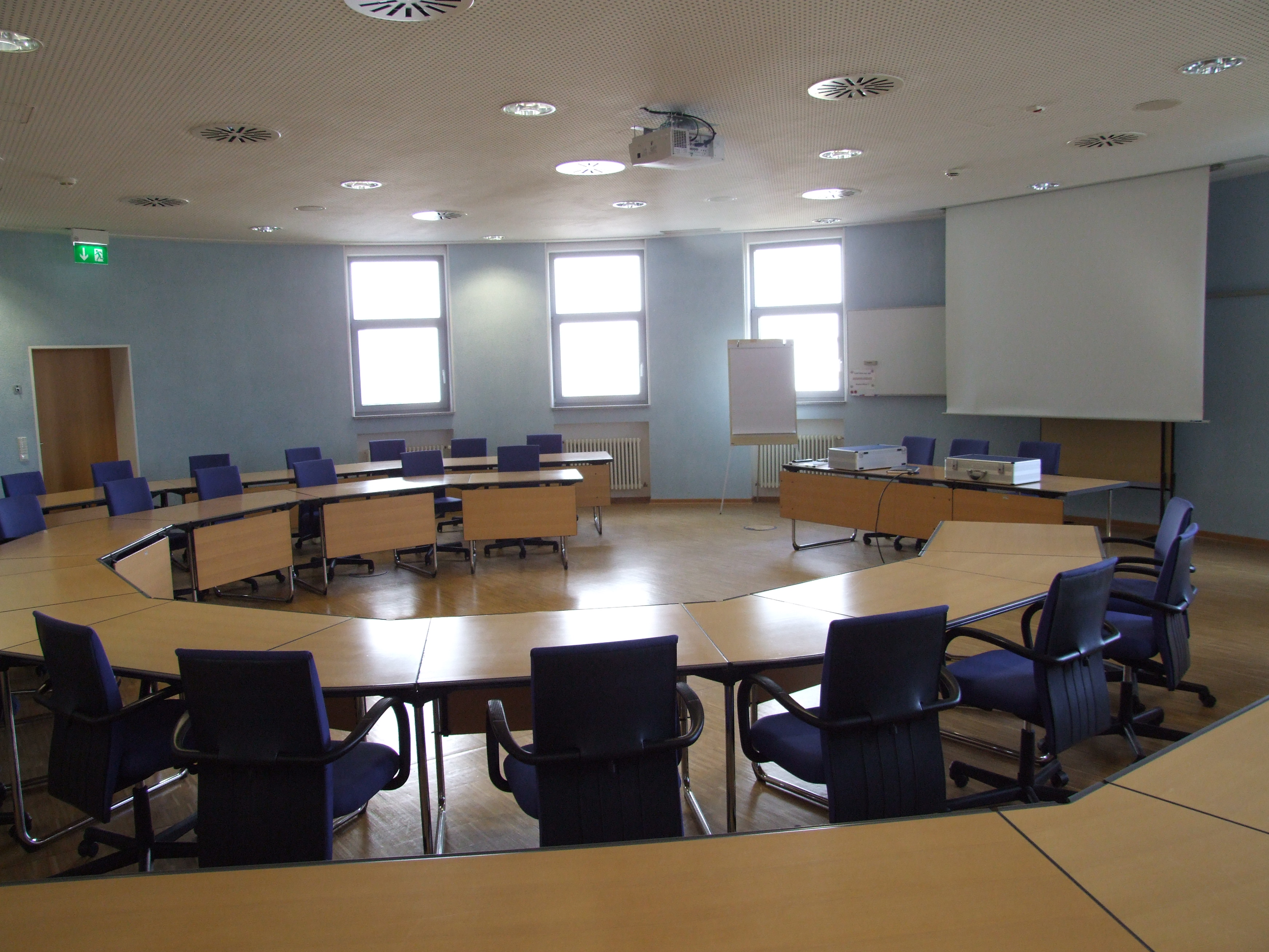 Universität Speyer, Freiherr-vom-Stein-Str. 2: Gästehaus Otto Mayer - runder Vortragssaal von Westen aus.